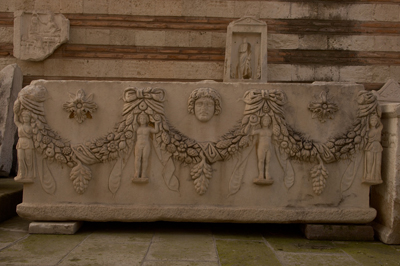 Roman-era sarcophagus in Manisa Museum, Turkey